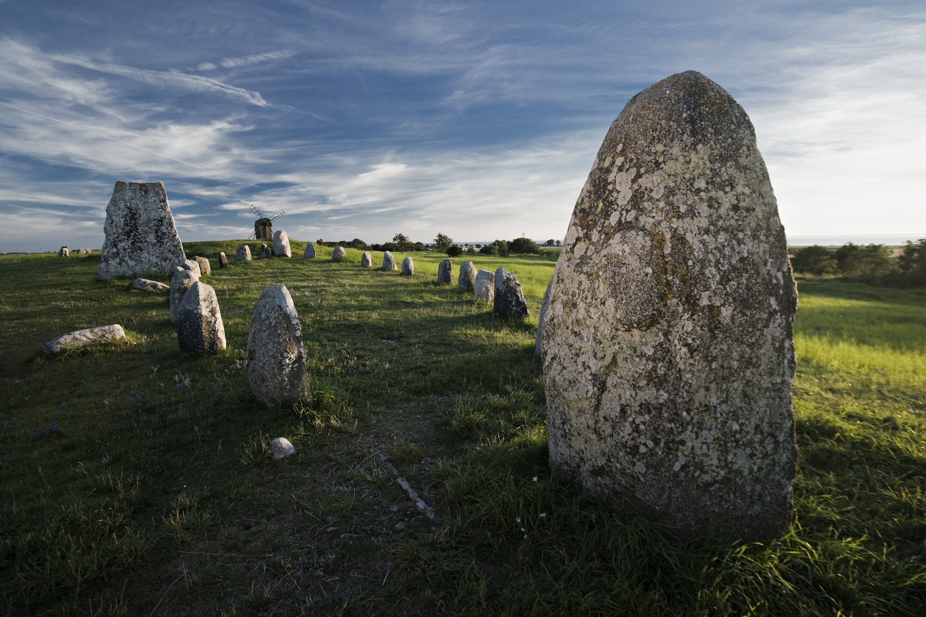 Copyright: Jonas Kullmann Ölands